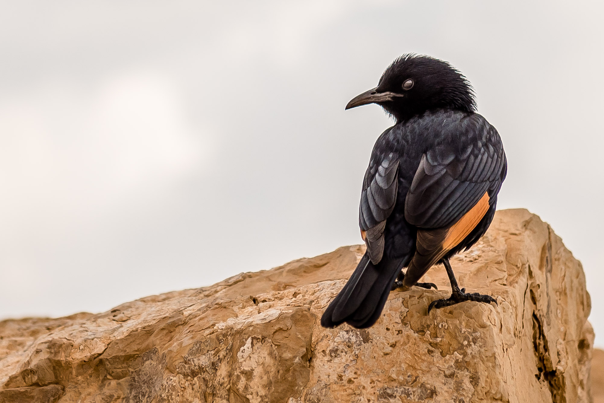 מצדה הוא מבצר עתיק על פסגתו של צוק מבודד, בשוליו המזרחיים של מדבר יהודה, המתנשא לגובה של 63 מטרים מעל פני הים, וכ-450 מטרים מעל ים המלח שלמרגלותיו. הצוק נבחר על ידי המלך הורדוס לשמש כמקום מפלט ומצודה מלכותית ועל פסגתו השטוחה נבנו ארמונות מפוארים, מבני ציבור ותענוגות. ביצורים הקיפו את המצוק ומערכות לאיסוף ואגירת מים הבטיחו אספקה שוטפת לכל אורך השנה. על פי יוסף בן מתתיהו, על מצדה עלה וצר, בשמונה מחנות מצור, הלגיון העשירי הרומאי ולאחר קרבות נואשים על חומות המבצר ומשאפסה תקוות המורדים להסיר את המצור הם בחרו להתאבד ולא לסיים את חייהם כעבדים.